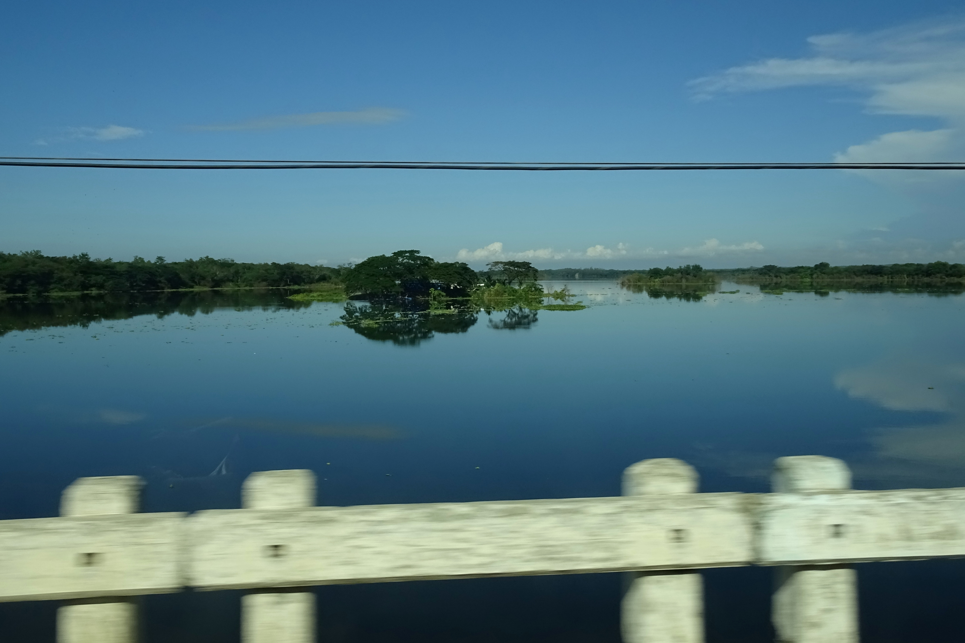 Embalse Protesta de Baragua, Mella, Santiago de Cuba Province, Cuba